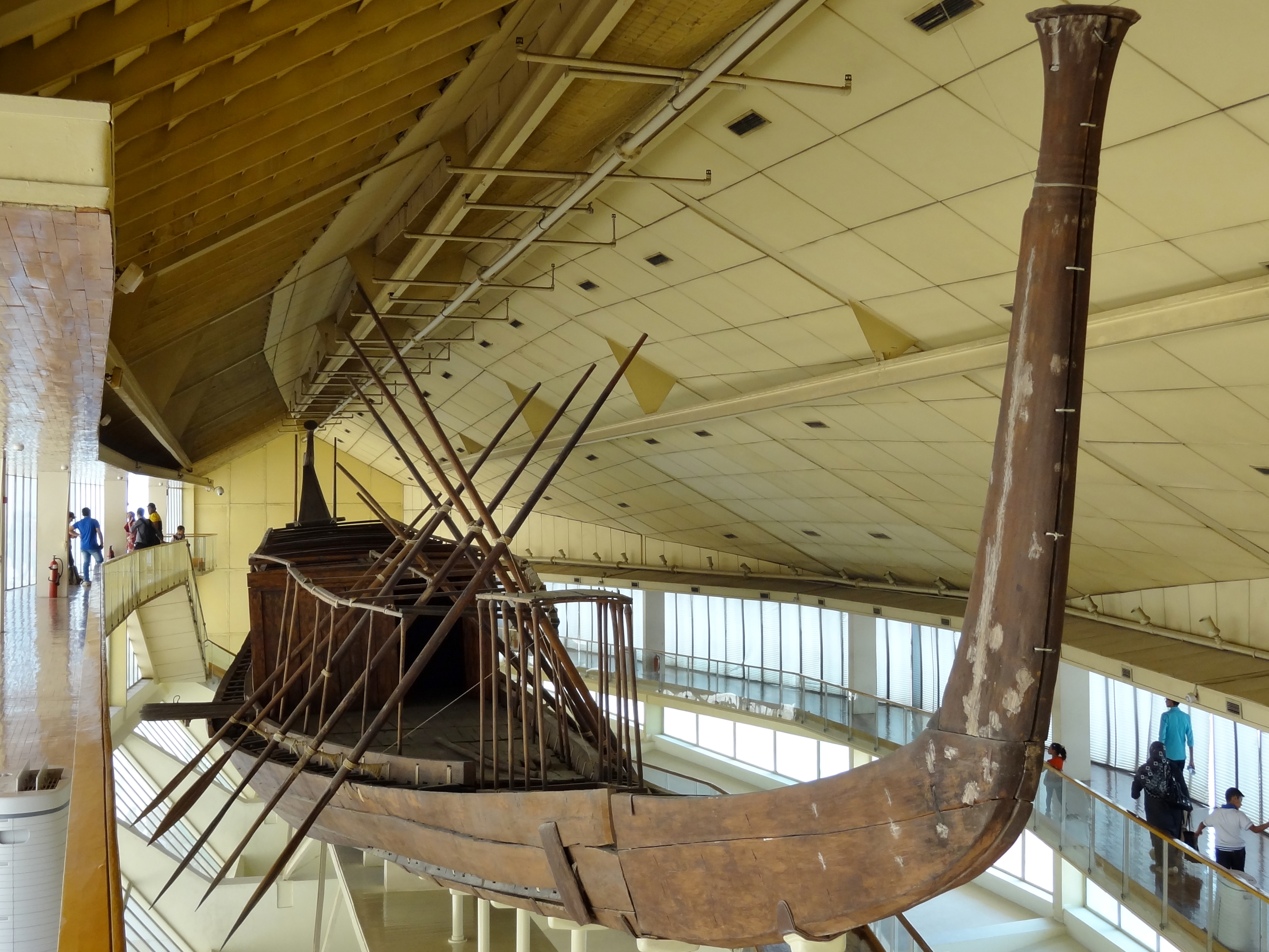 Sonnenbarke des Cheops im Museum neben der Cheops-Pyramide in Giseh, Ägypten